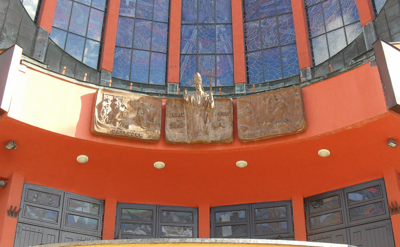 Wrocław, kościół pw. Ducha Świętego, płaskorzeźby nad wejściem